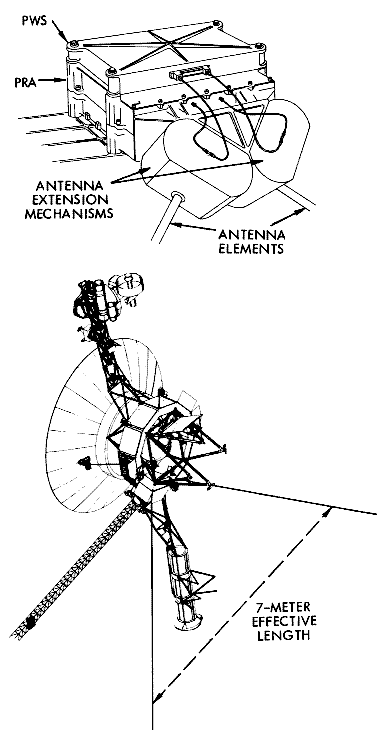 Voyager probe: Plasma Wave System